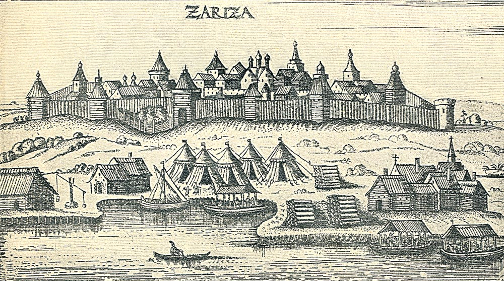 Царицын